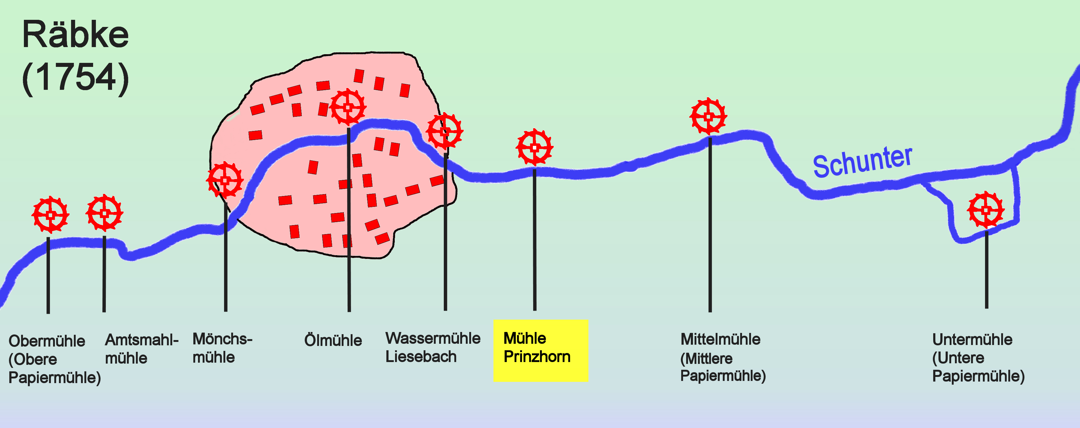 Mühle Prinzhorn, Zeichnung nach der Braunschweigischen General-Landesvermessung von 1754